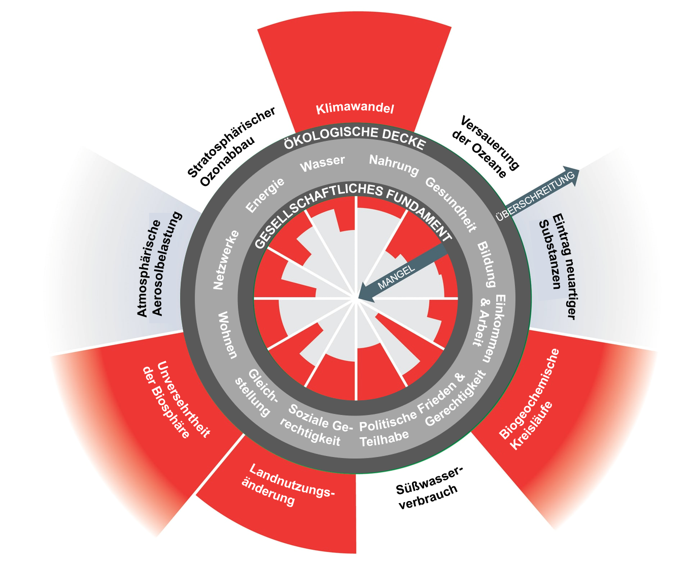 Visualisierung des Donutmodells von Kate Raworth mit deutschen Beschriftungen